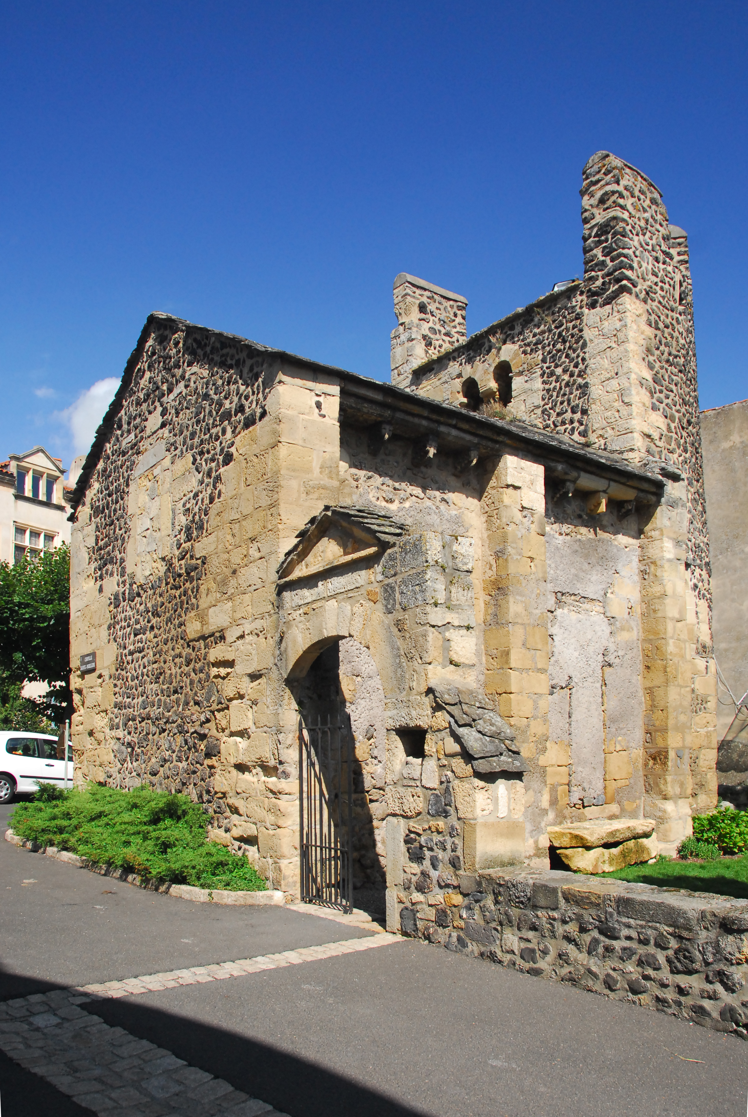 St-Saturnin,_Chapelle_Ste-Madeleine